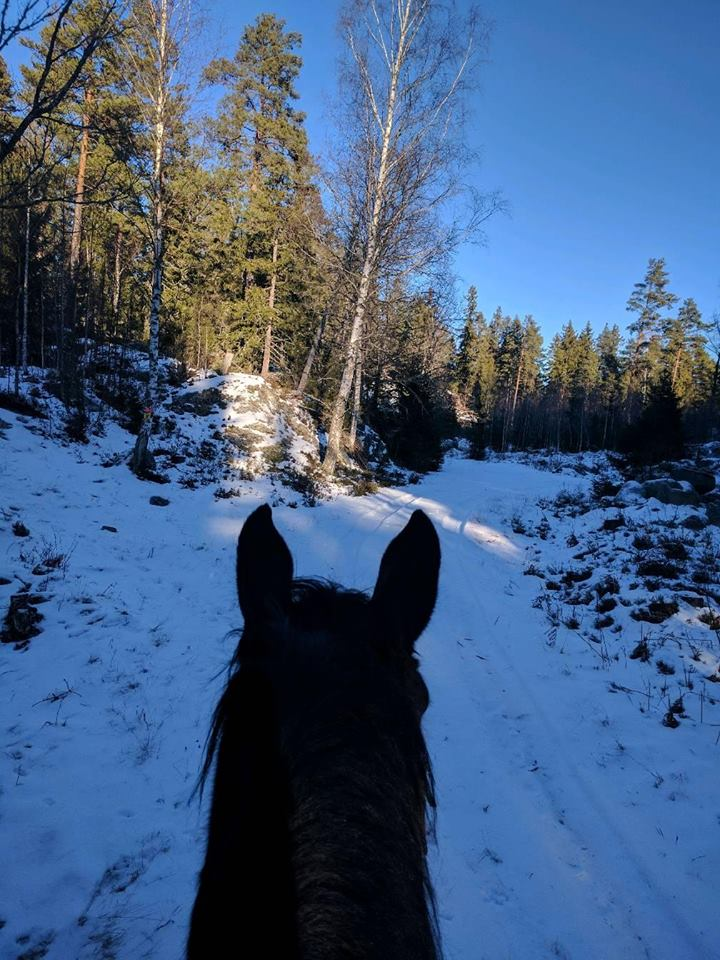 Auch im Winter lassen sich viele Wege gut bereiten und durch den Schnee entsteht eine besondere Stimmung